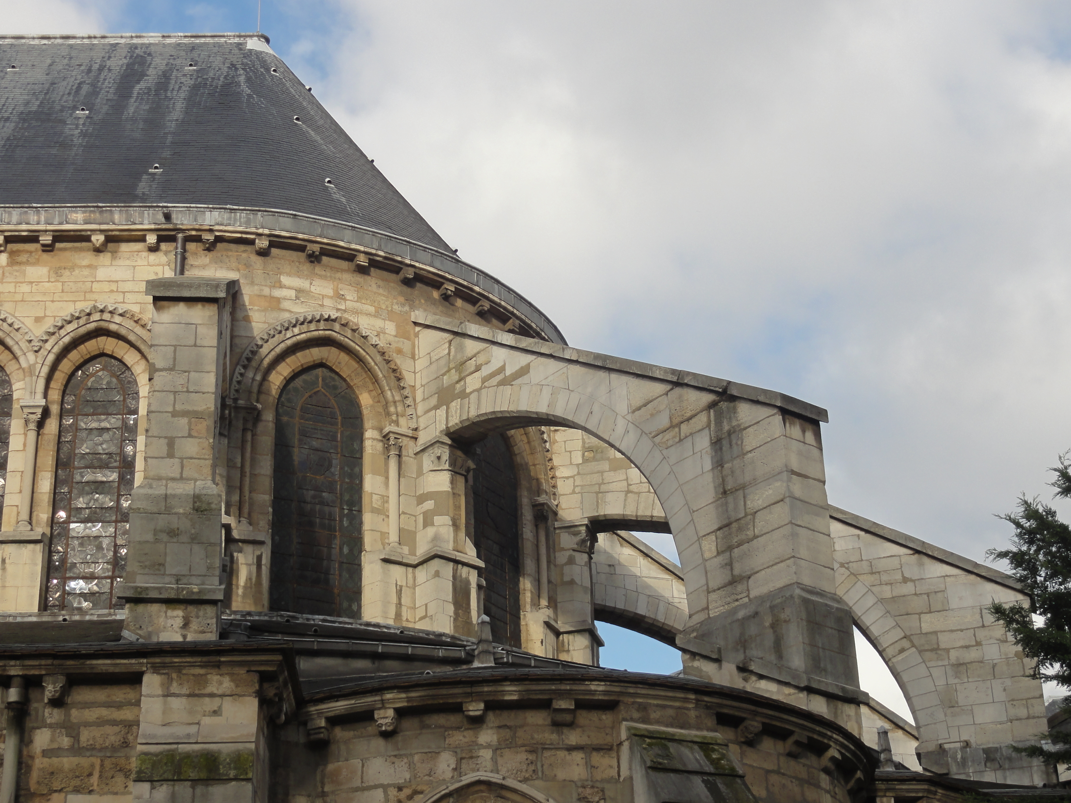 Abside, parties hautes côté sud.